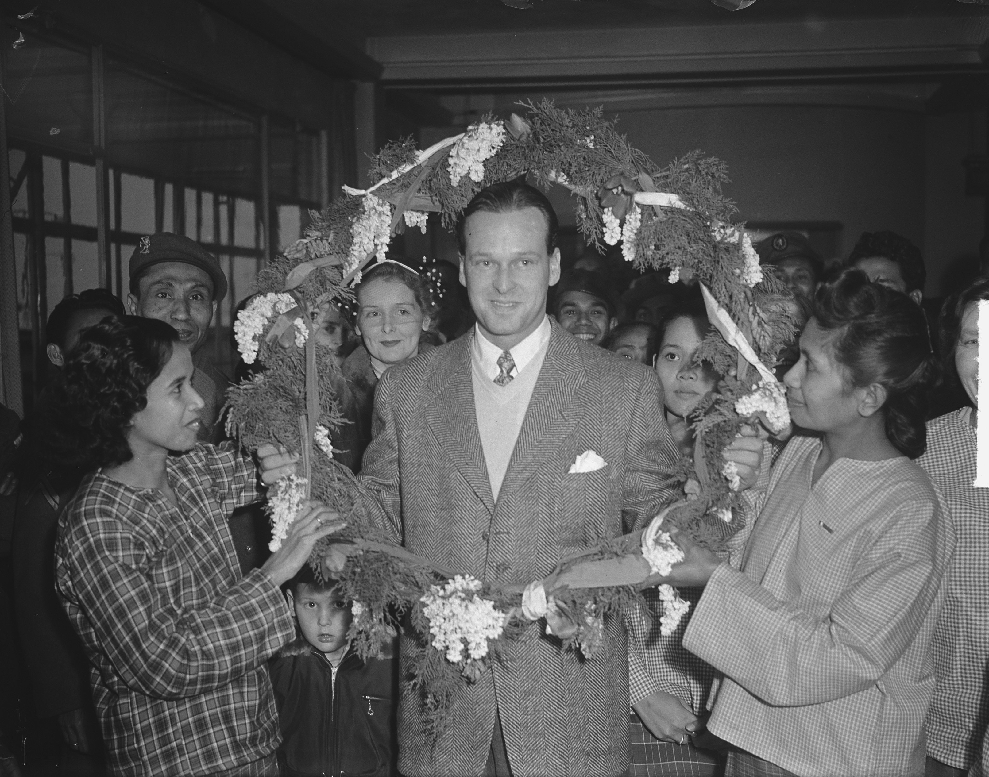 E. Hazelhof Roelfzema terug op Schiphol, 17 februari 1951. Begroeting door Ambonese (Molukse!) vrouwen